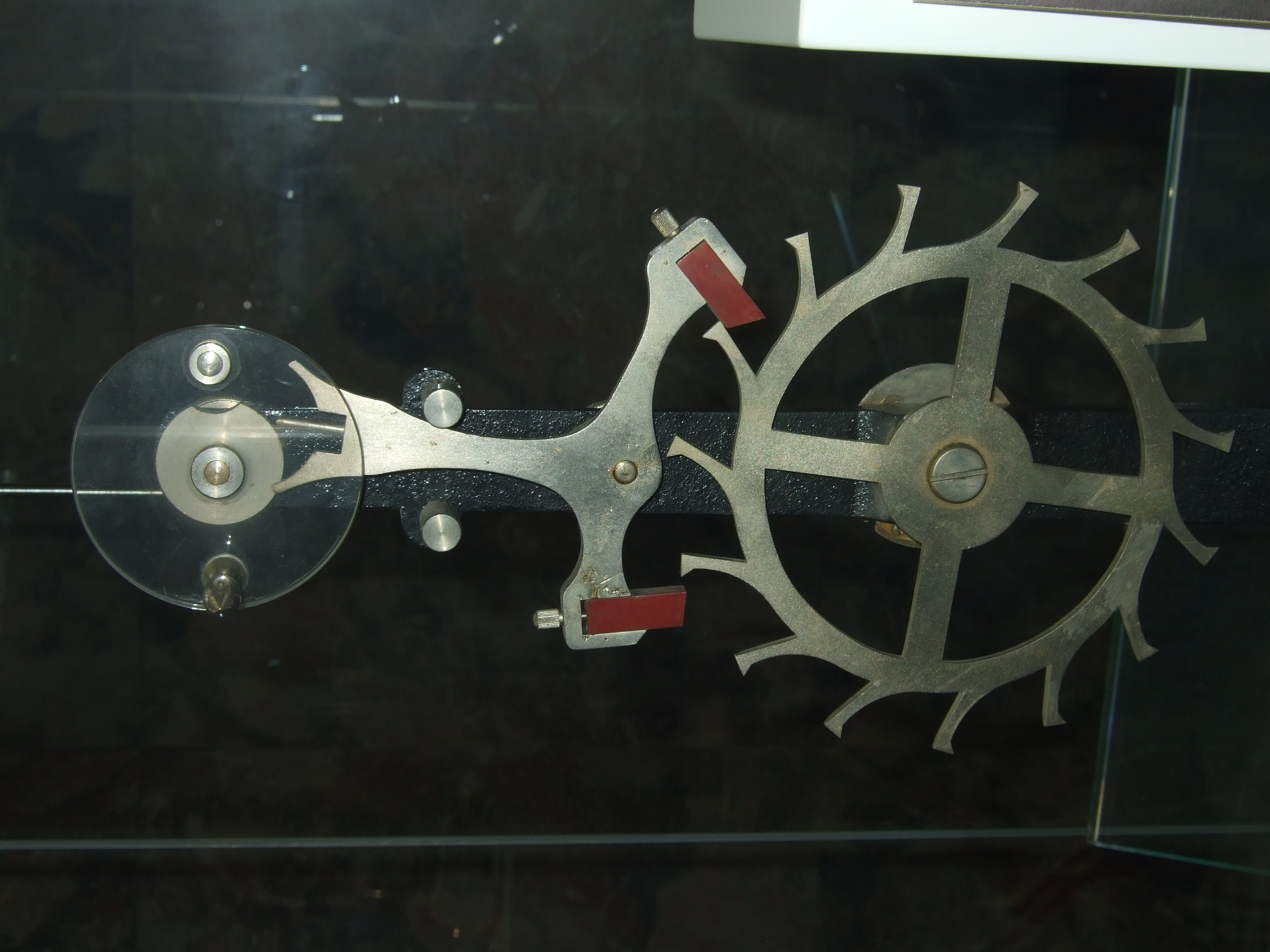 Funktionsmodell einer Palettenankerhemmung. (Ausgestellt in der Uhrensammlung Karl Gebhardt in Nürnberg.)